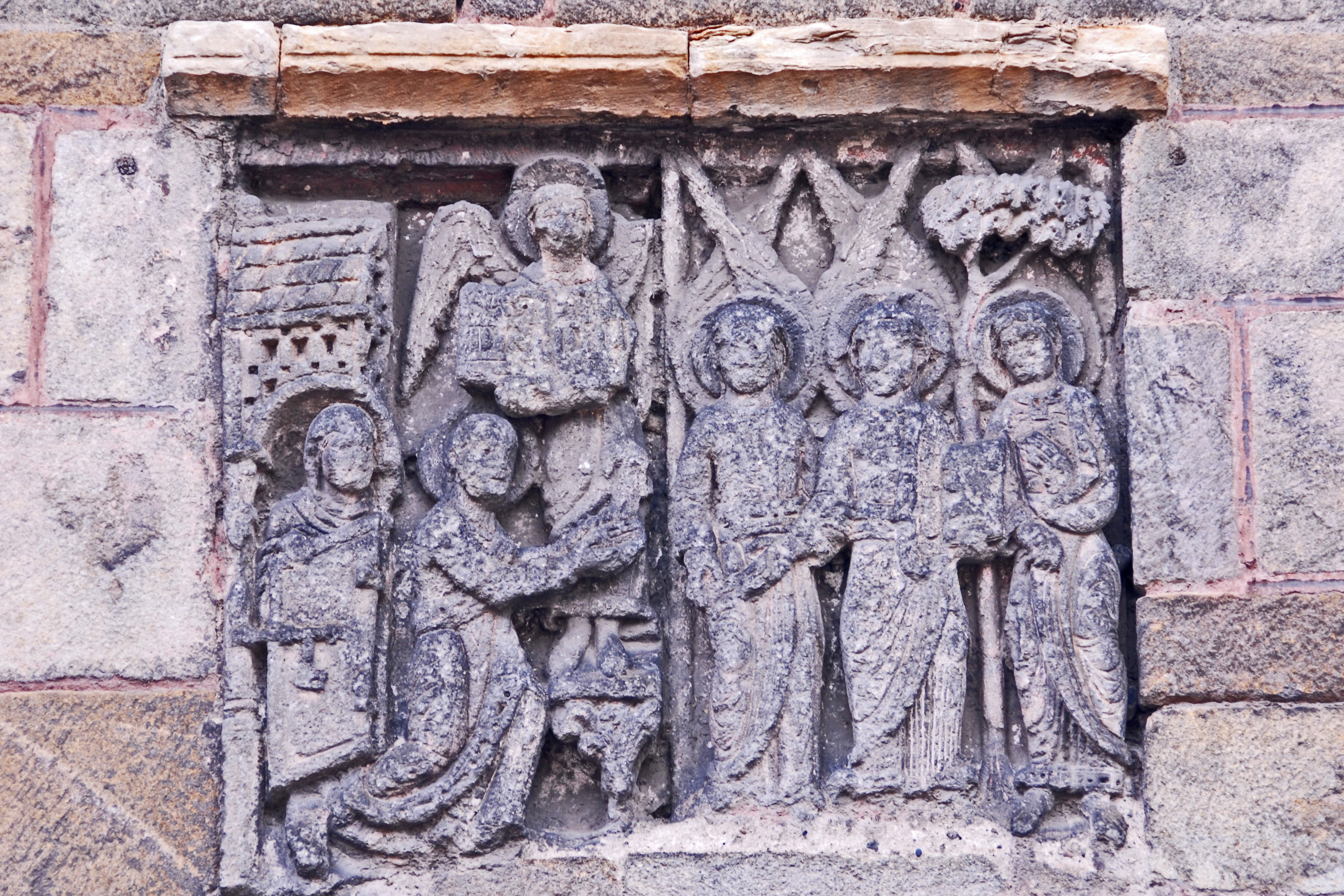 Nördl.Querhausgiebel, Relief, der Herr besucht Abraham